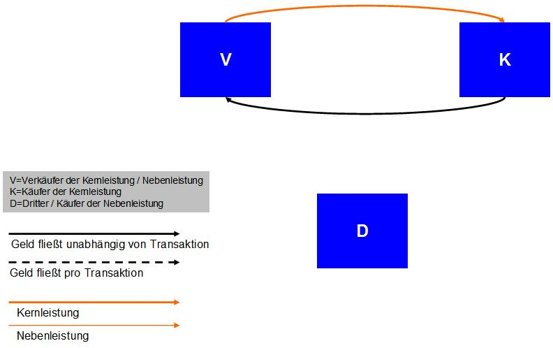 Transaktionunabhängige indirekte Erlösgenerierung